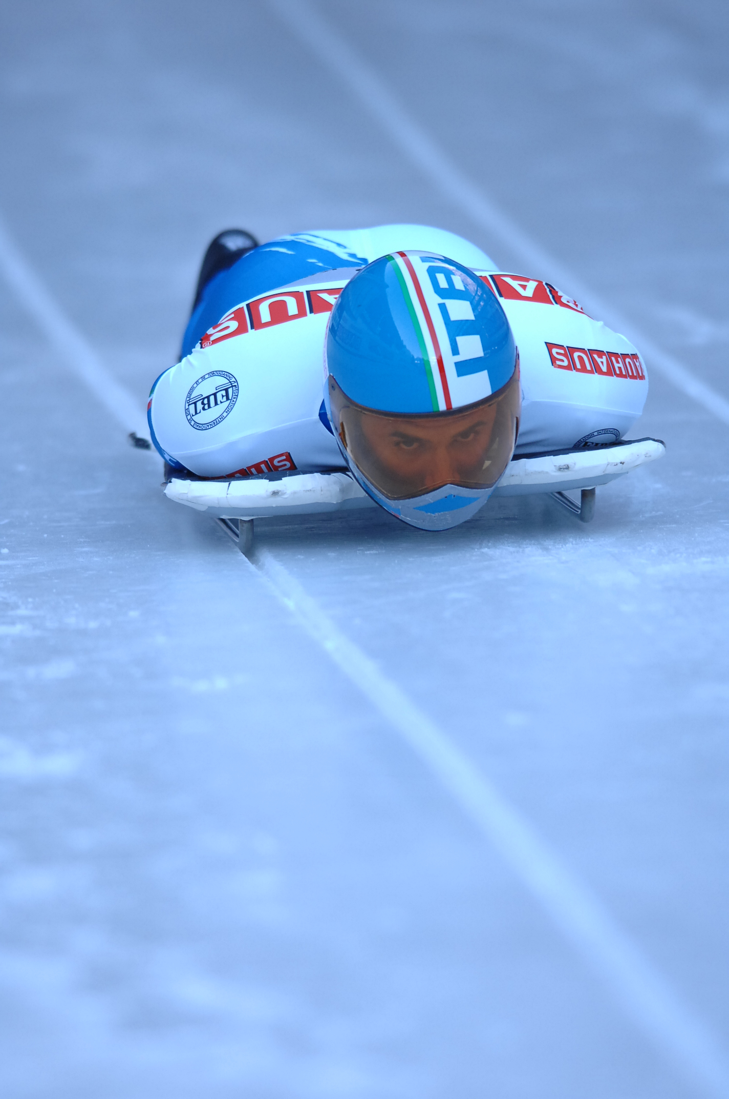 Scendendo